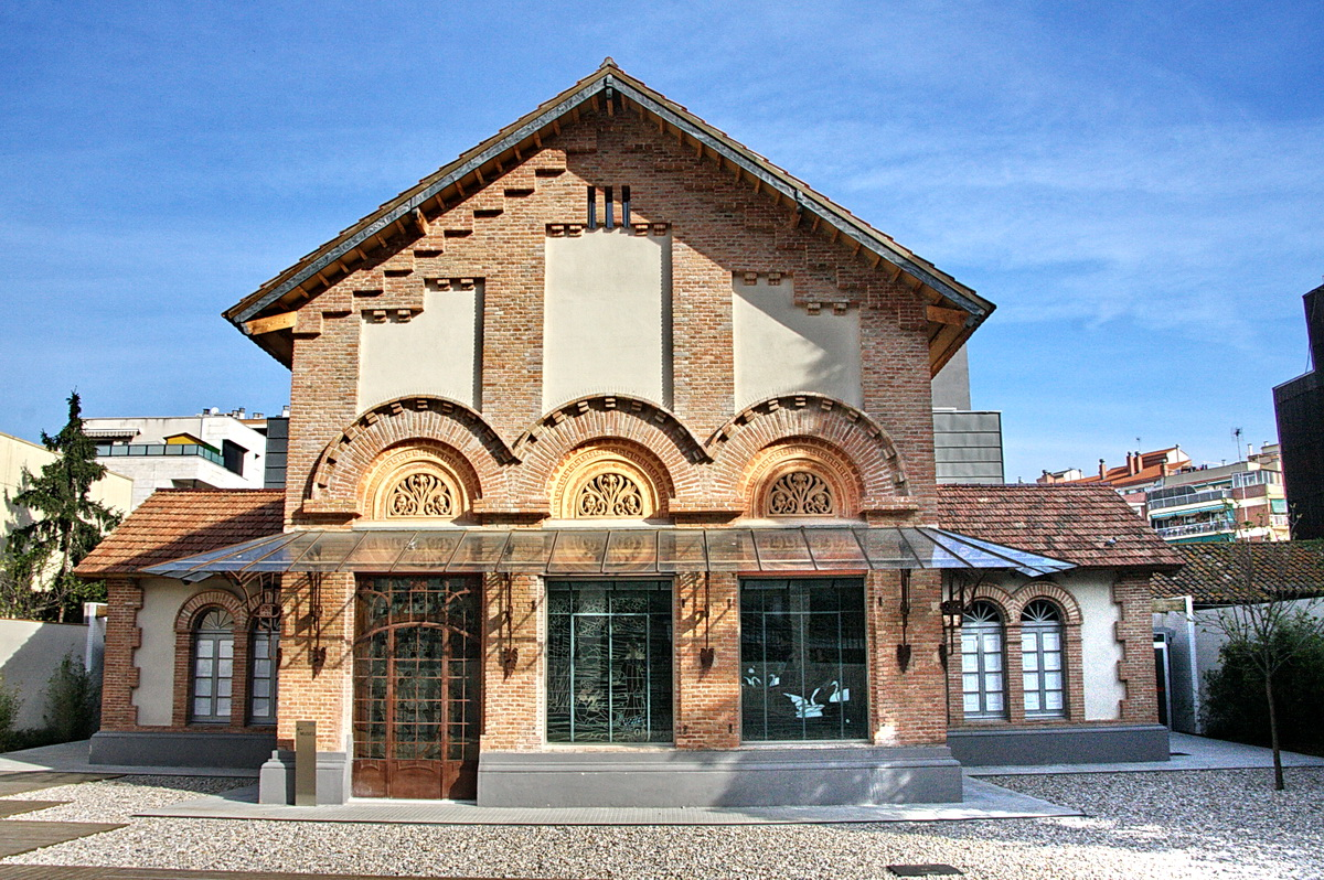 Can Domènech, obra noucentista de 1922 de Gaietà Buïgas i Monravà a Cerdanyola del Vallès (Vallès Occidental-Catalunya) . Actualement és el Museu d'Art de Cerdanyola.